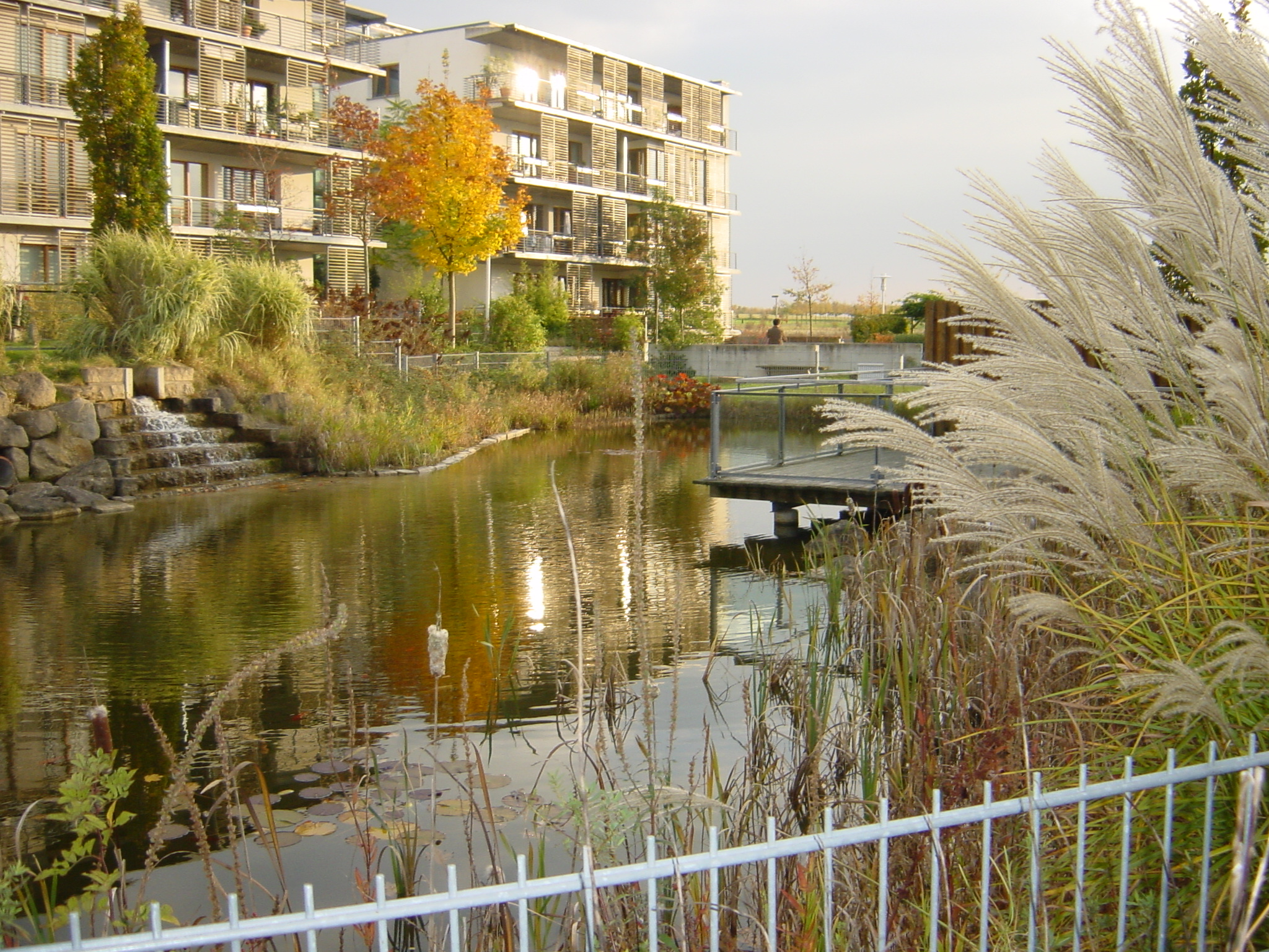 Beispiel einer Innenhofgestaltung in der Wohnsiedlung